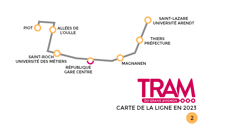 Tracé de la ligne 2 du Tramway du Grand Avignon